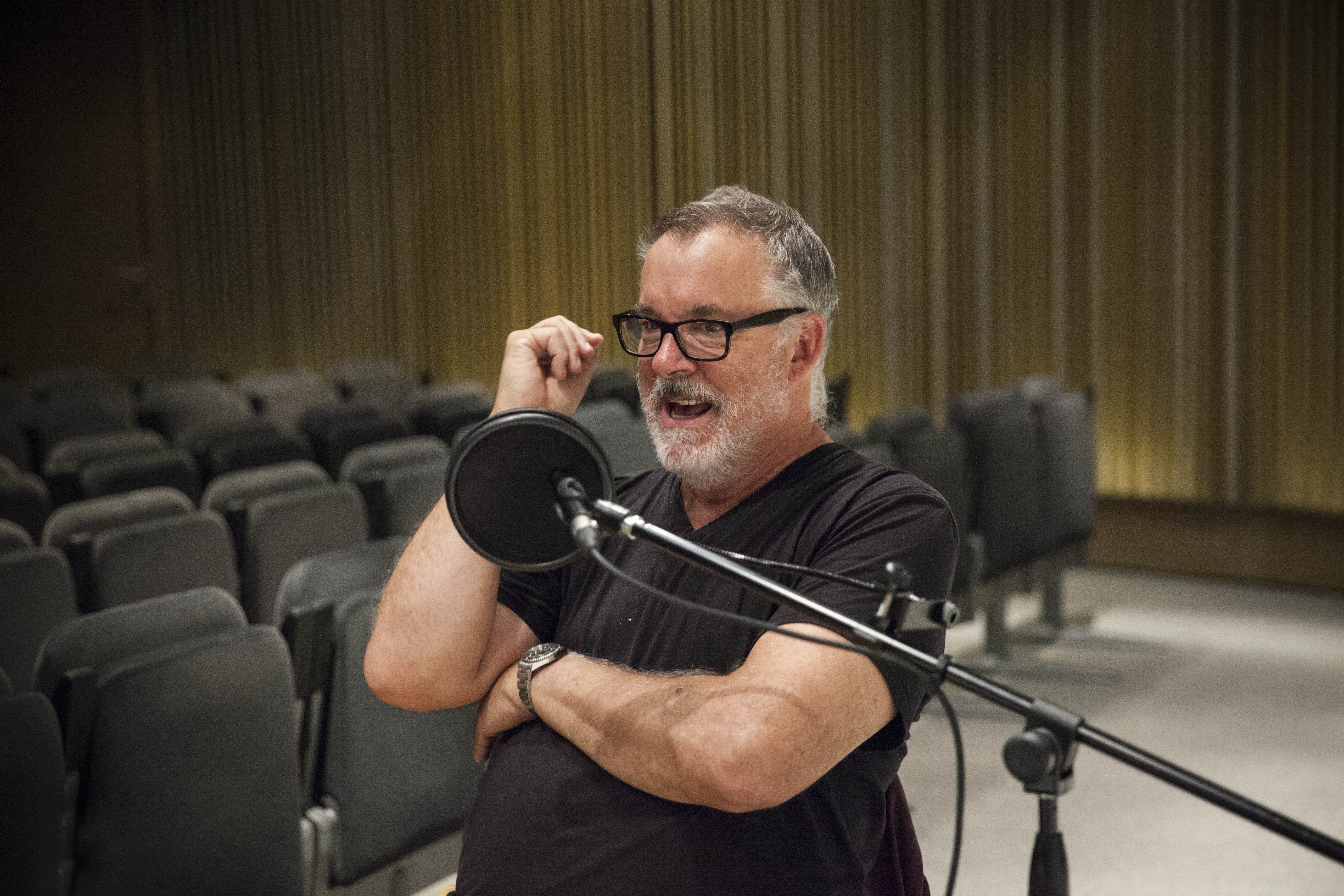 Matt Mullican a Radio Web MACBA